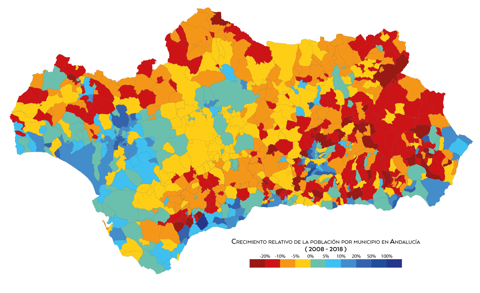 Crecimiento de la población por municipio en Andalucía entre los años 2008 y 2018